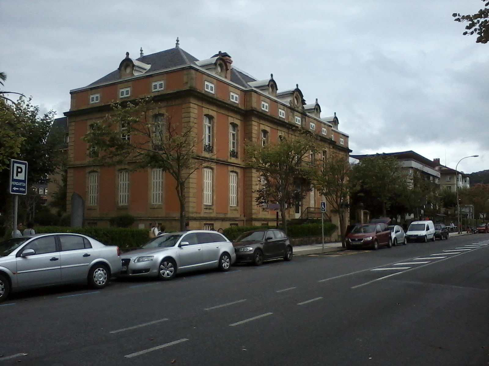 Casa de cultura Sanz Enea. Biblioteca municipal y exposiciones itinerantes.